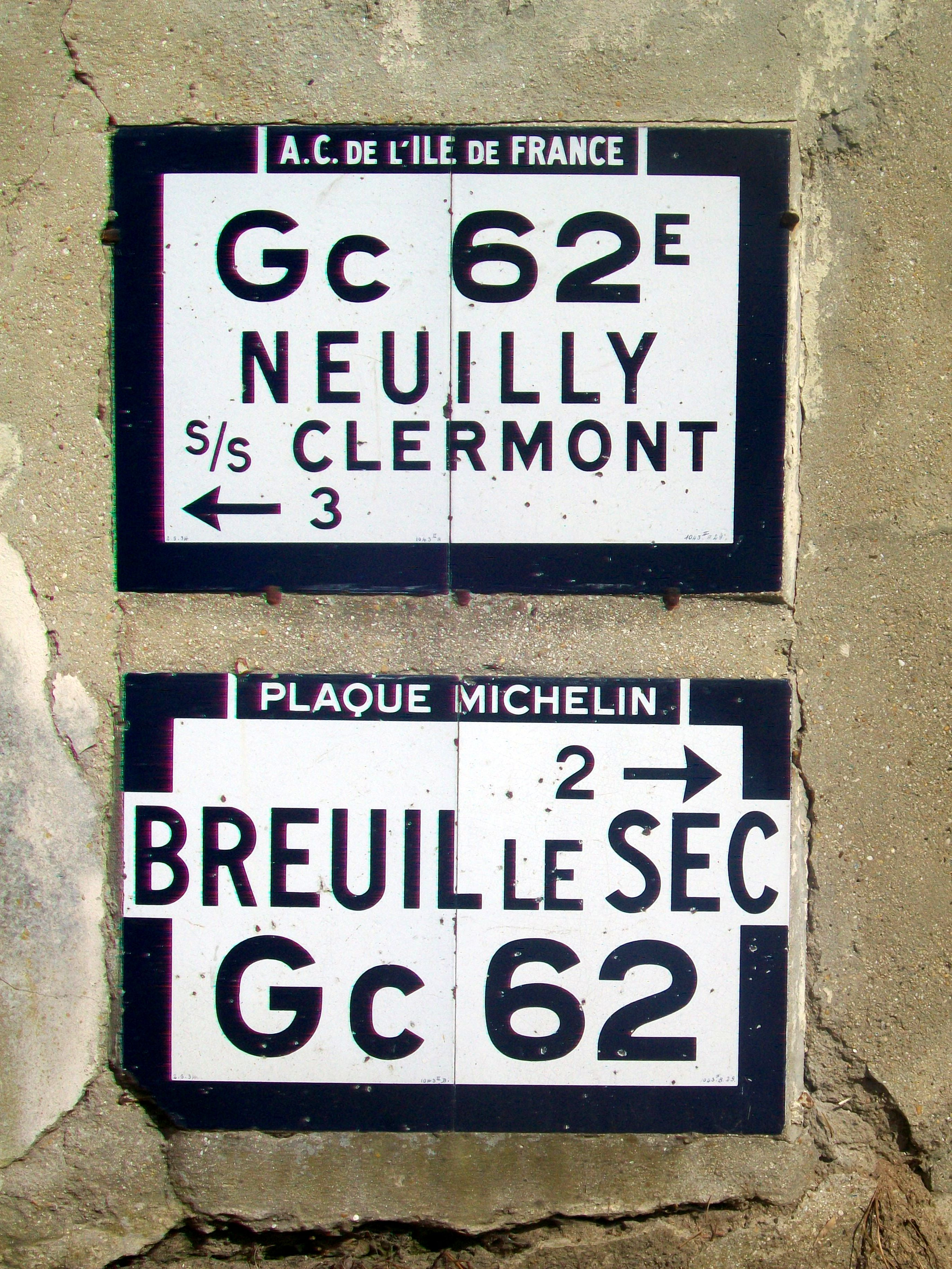 Vieilles plaques Touring Club de France et Michelin au hameau de Sénécourt.